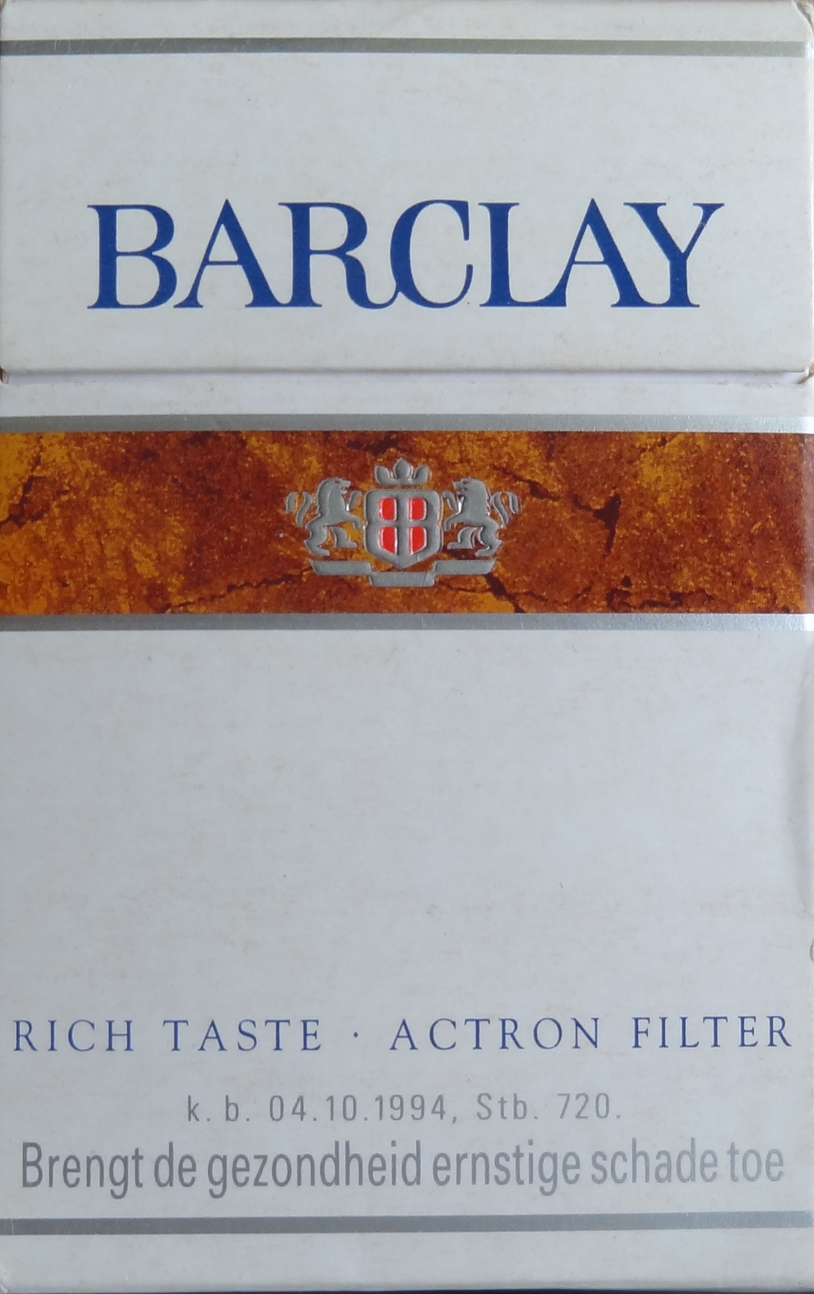 Barclay sigaretten